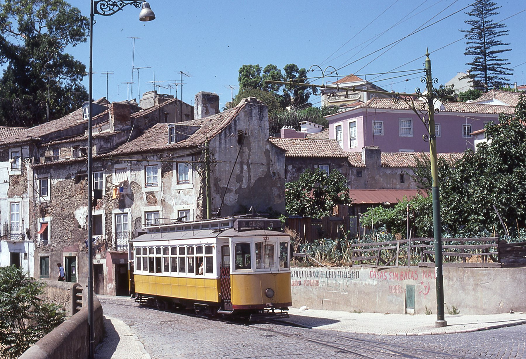 Ligne 3, direction P. BISPO (ligne disparue le 18.11.1991) Tram 332 fait partie de la série 323-342, il existe encore à ce jour, de cette série les trams 324 - 326 - 327 - 328, les trams 329 et 330 au musée du Trams de Lisbonne, les trams 332 et 333 dans un parc à Oeiras, près de Lisbonne, les trams 334 - 336 - 337 - 339 - 341- et le tram 342 en Argentine à la cité del Plata. Les trams 325 - 331 - 335 - 338 - 340 ont été démolis en 1995